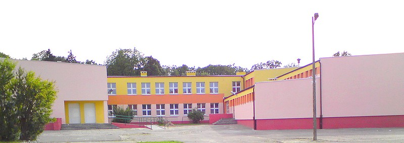 Szkoła Podstawowa nr 3 w Gryficach